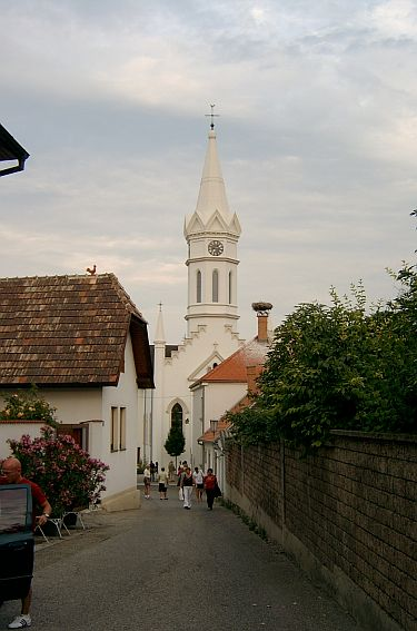 Kirche von Mörbisch. Rechts im Vordergrund ein für die Gegend typisches Storchennest. selbst fotografiert am 24.7. 04 (GNU)